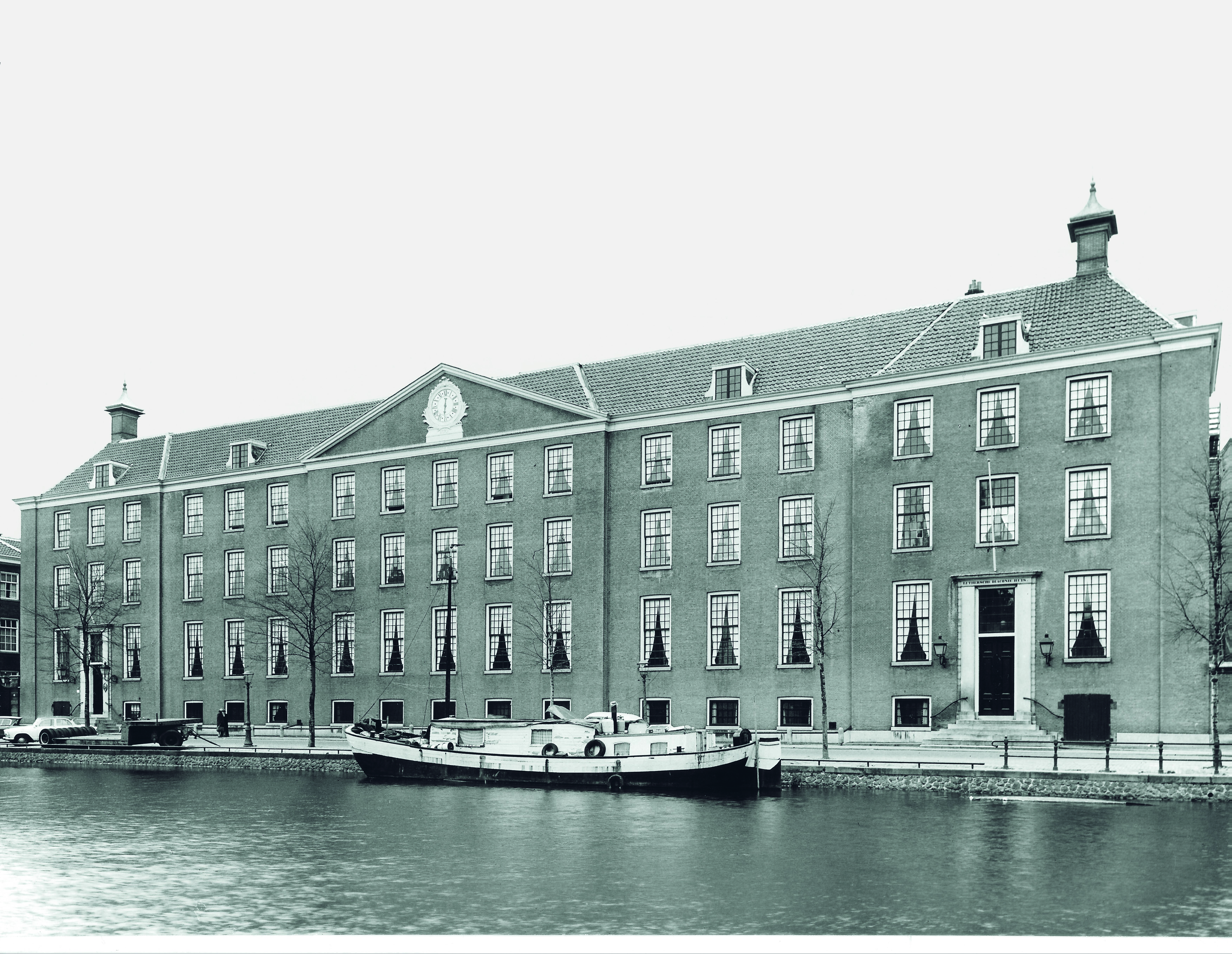 Foto van het ELOMVH. Ook wel 'gebouw de Wittenberg' genoemd. Nieuwe Keizersgracht Amsterdam